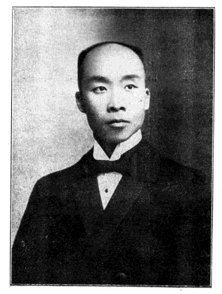 中文（台灣）: 中華民國國會議員